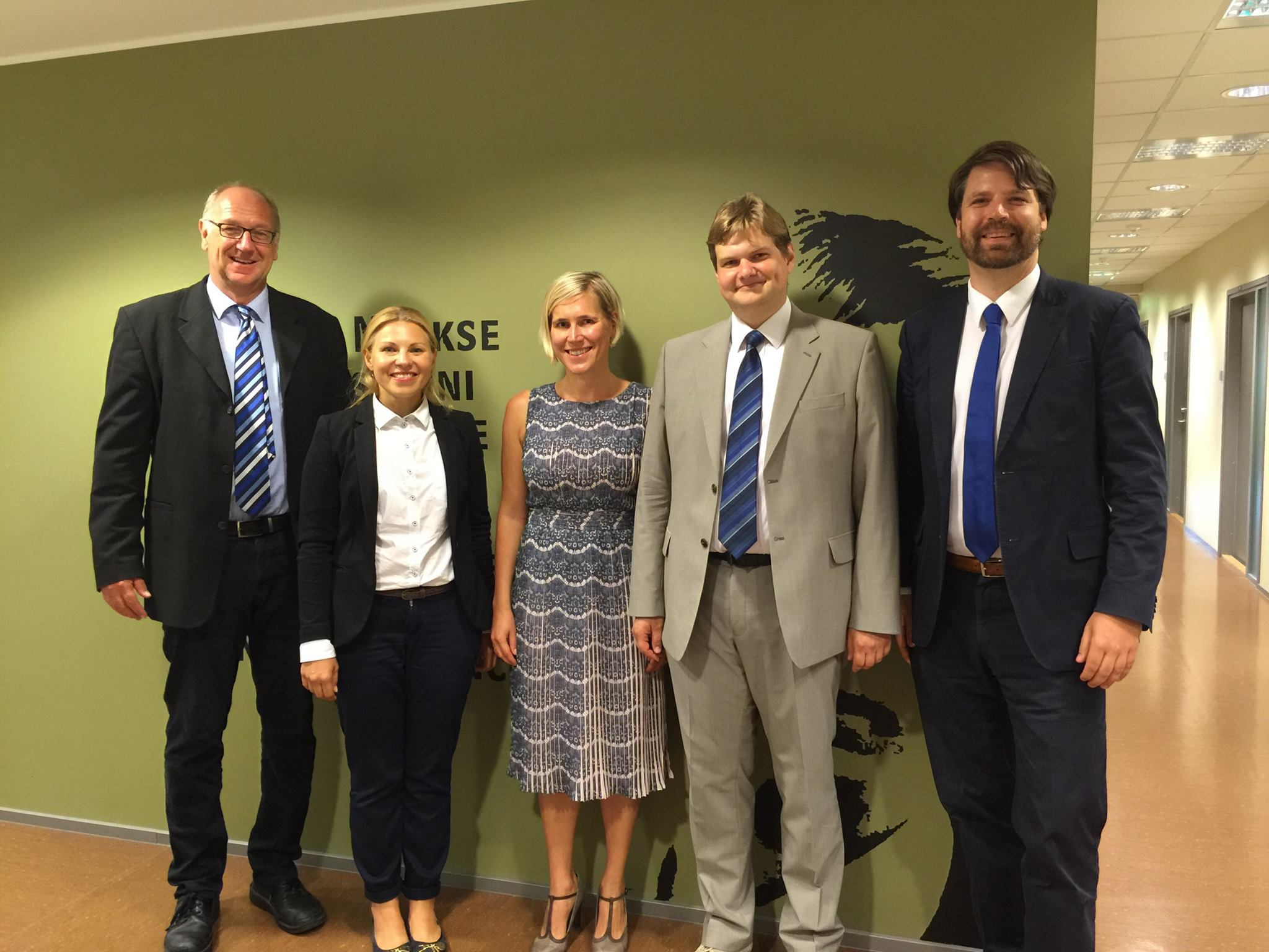 Norbert Kersting,Magdalena Musiał-Karg, Ülle Madise and Priit Vinkel, Ragnar Nurkse School of Innovation and Governance